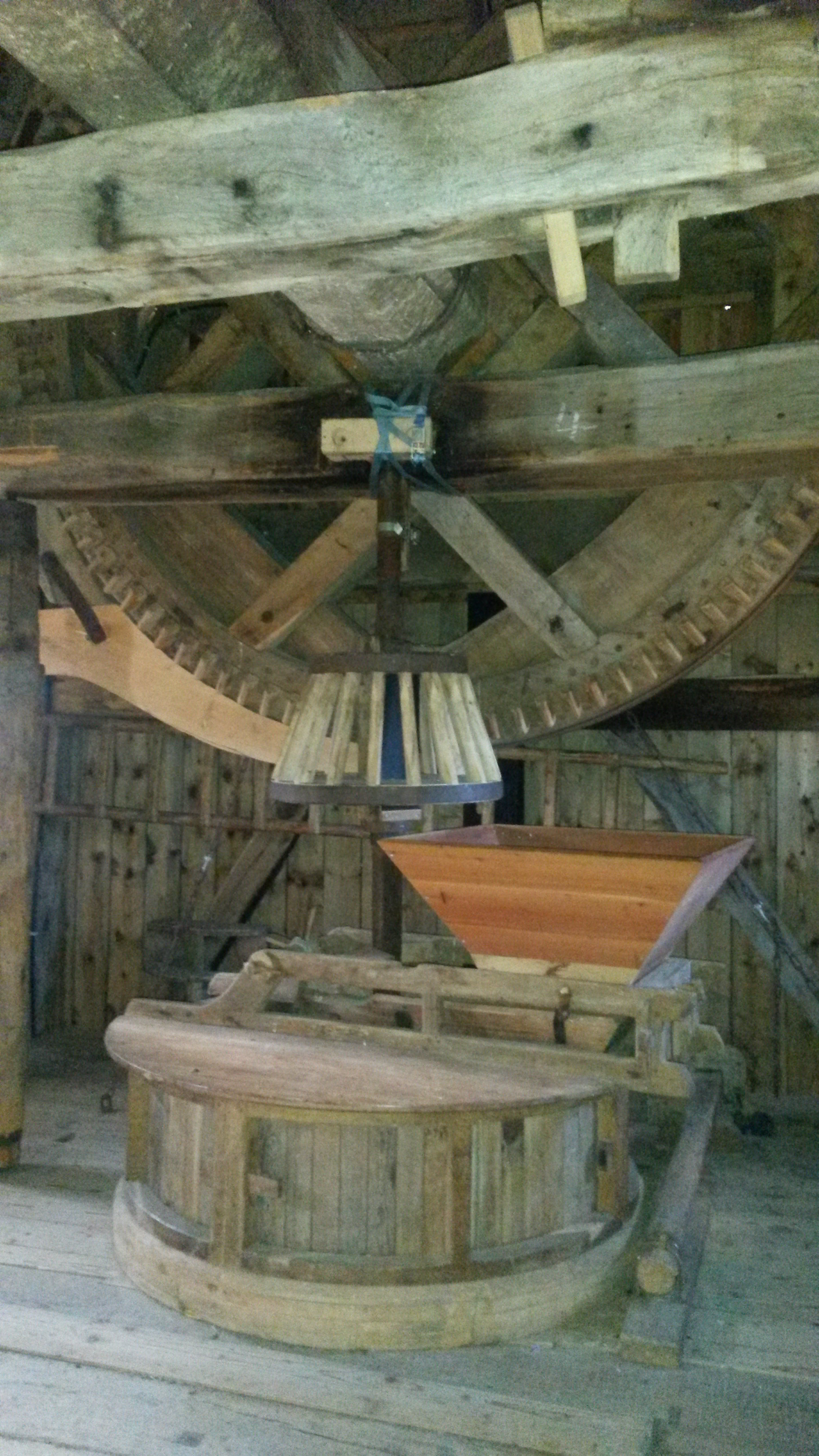 Bockwindmühle von der Papenhorst, innen